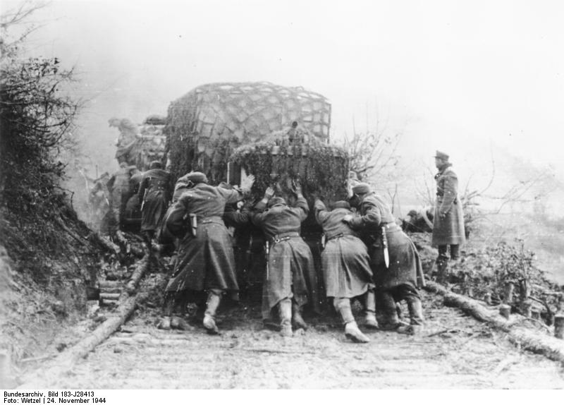 Jugoslawien, deutscher Rückzug Auf den Strassen des Balkans Weder die Tücken des Geländes noch die Launen des Wetters können die Bewegungen unserer Truppen auf dem Balkan beeinträchtigen. Dauernder Regen hat die Strassen aufgeweicht. Ein Knüppeldamm hat sie wieder befahrbar gemacht. Über ihn rollen nun die Kolonnen unbehindert weiter. PK-Kriegsberichter Wetzel, Scherl 19.12.1944 [Herausgabedatum] ADN-ZB/Archiv II.Weltkrieg 1939 1945 Absetzbewegungen der faschistischen deutschen Wehrmacht im November 1944 bei Visegrad in Jugoslawien vor der siegreich vordringenden sowjetischen Armee und den jugoslawischen Partisanen; aufgenommen am 24. November 1944. PK: Wetzel [PK 690]